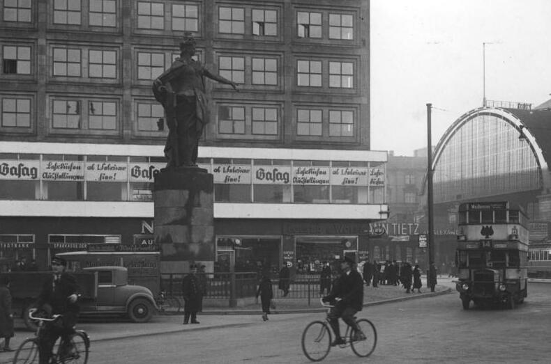 Berlin, die "Berolina" auf dem Alexanderplatz ADN-ZB-Archiv Berlin-Alexanderplatz, um 1937 Die in Kupfer getriebene Figur der Berolina, 1895 von Hundrieser geschaffen, auf ihrem neuen Standplatz vor dem Alexanderhaus. [Scherl Bilderdienst]